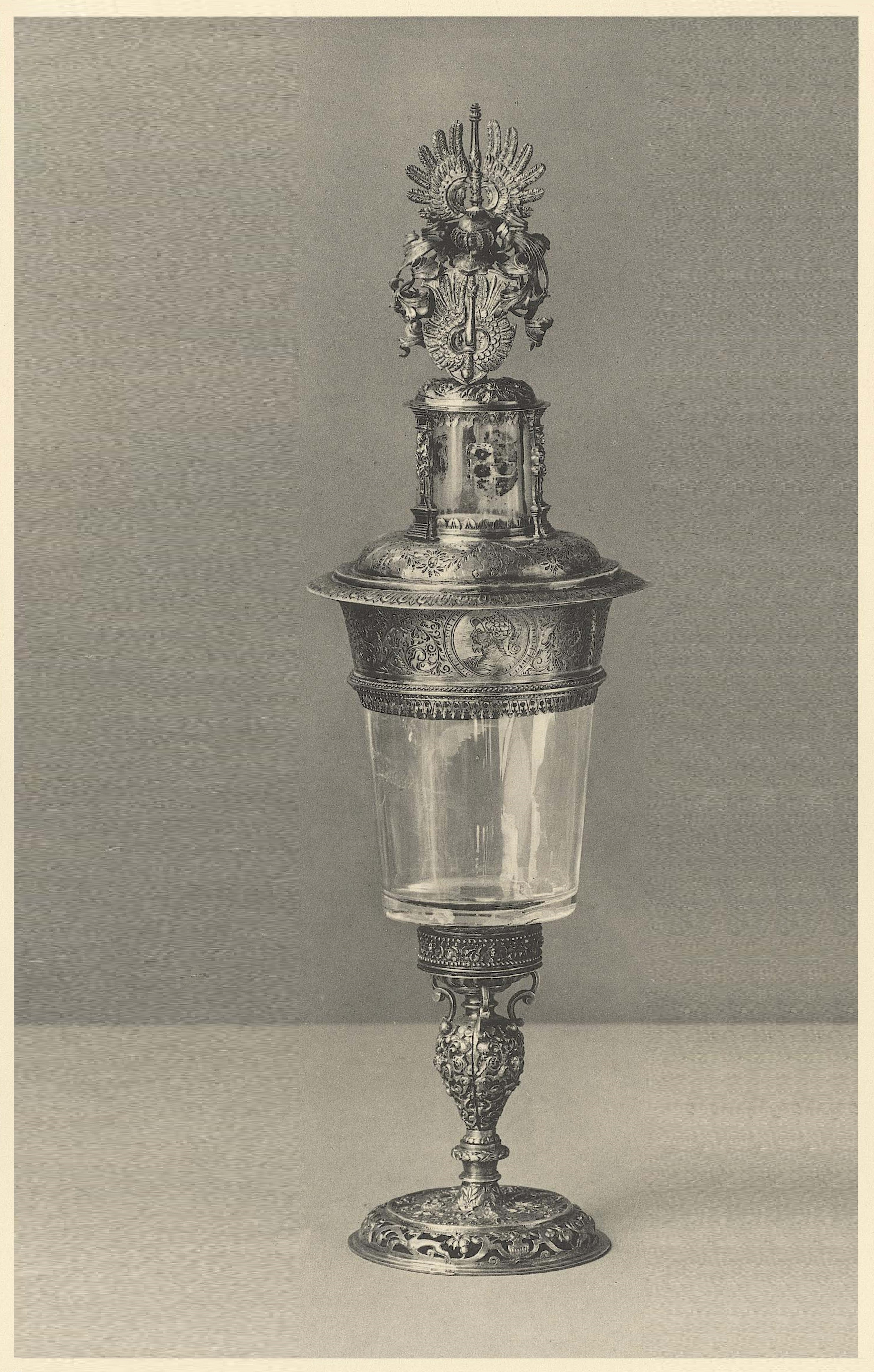 Martin Luther - Nesen Becher